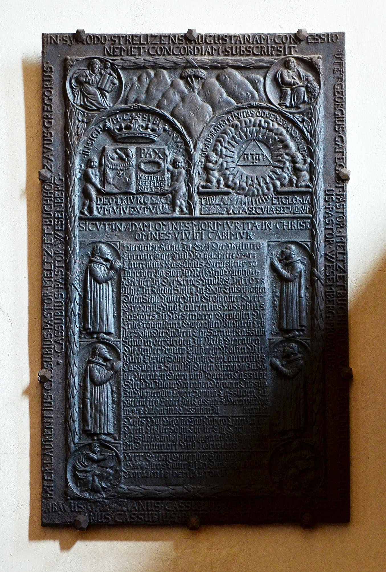 Röbel, Nicolaikirche, Grabtafel 1